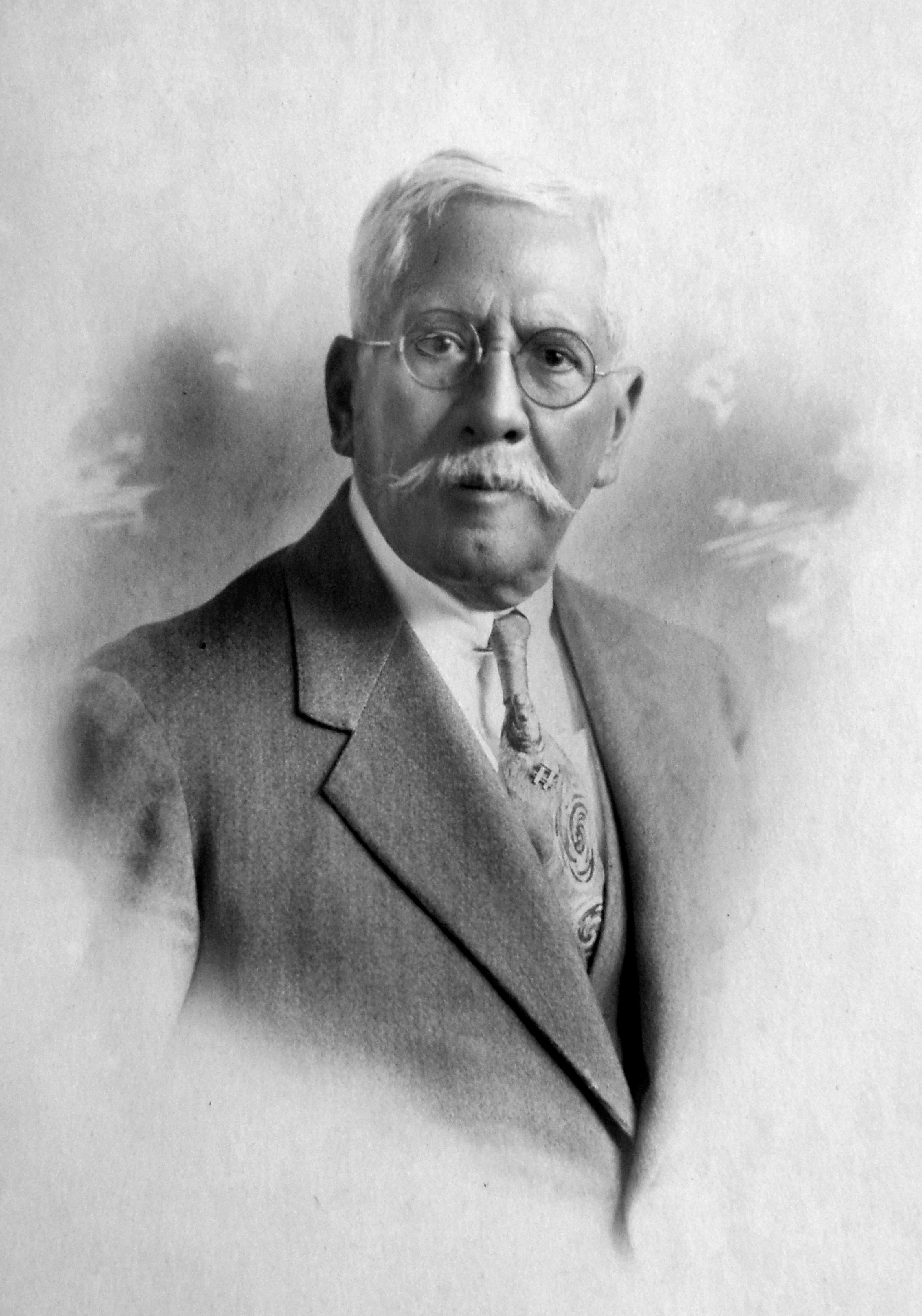 Lic. J.N. Macías en su edad madura. Tomada de álbumes familiares.